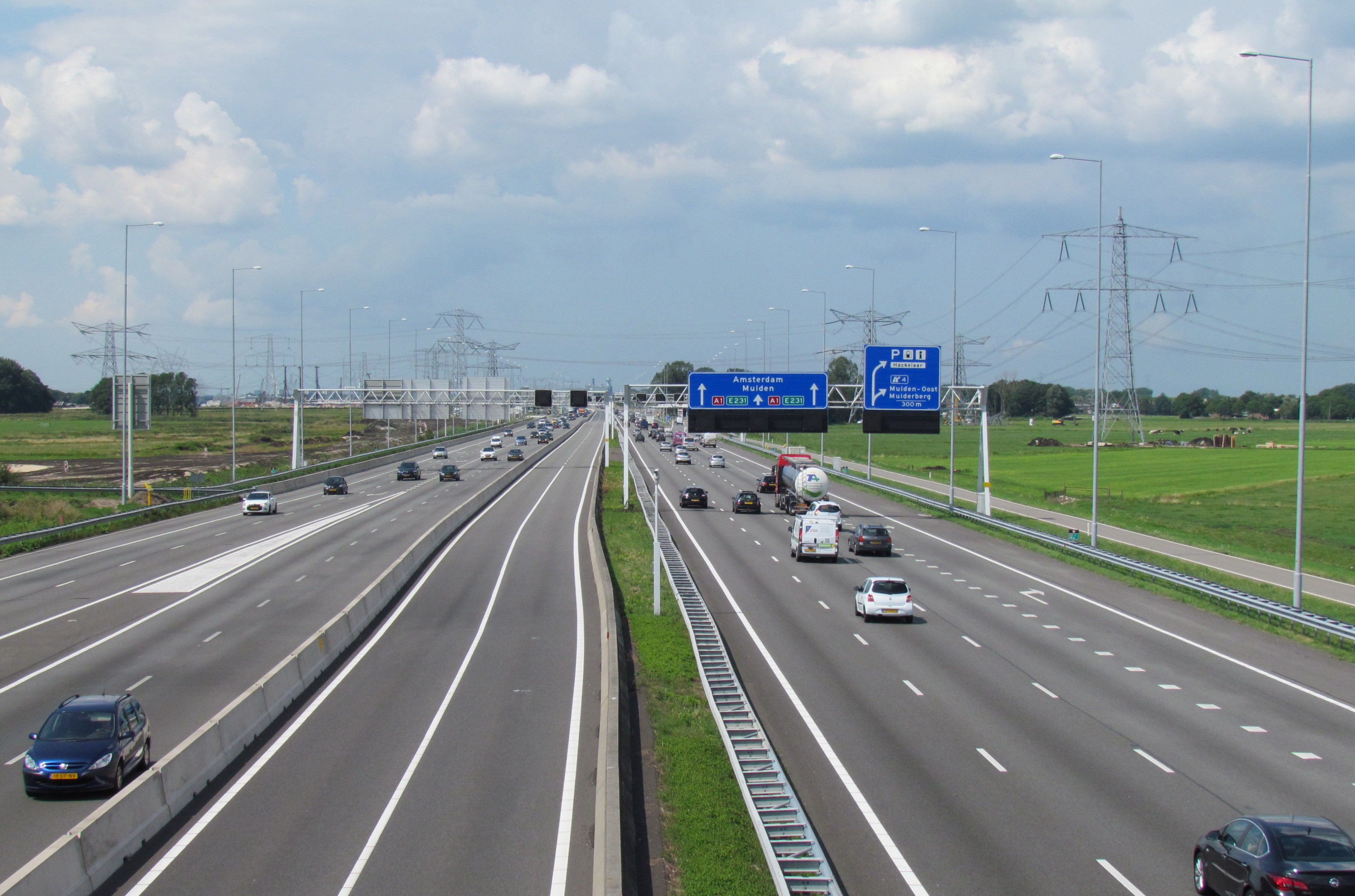 De Nederlandse snelweg A1 ten westen van knooppunt Muiderberg, in westelijke richting